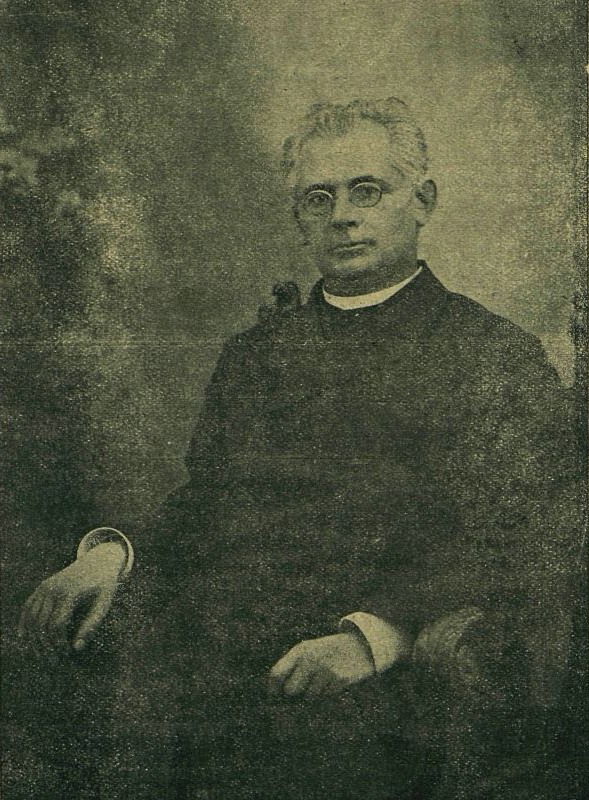 Martin Kollár - rímskokatolícky kňaz, národnokultúrny pracovník, spisovateľ, redaktor a prekladateľ